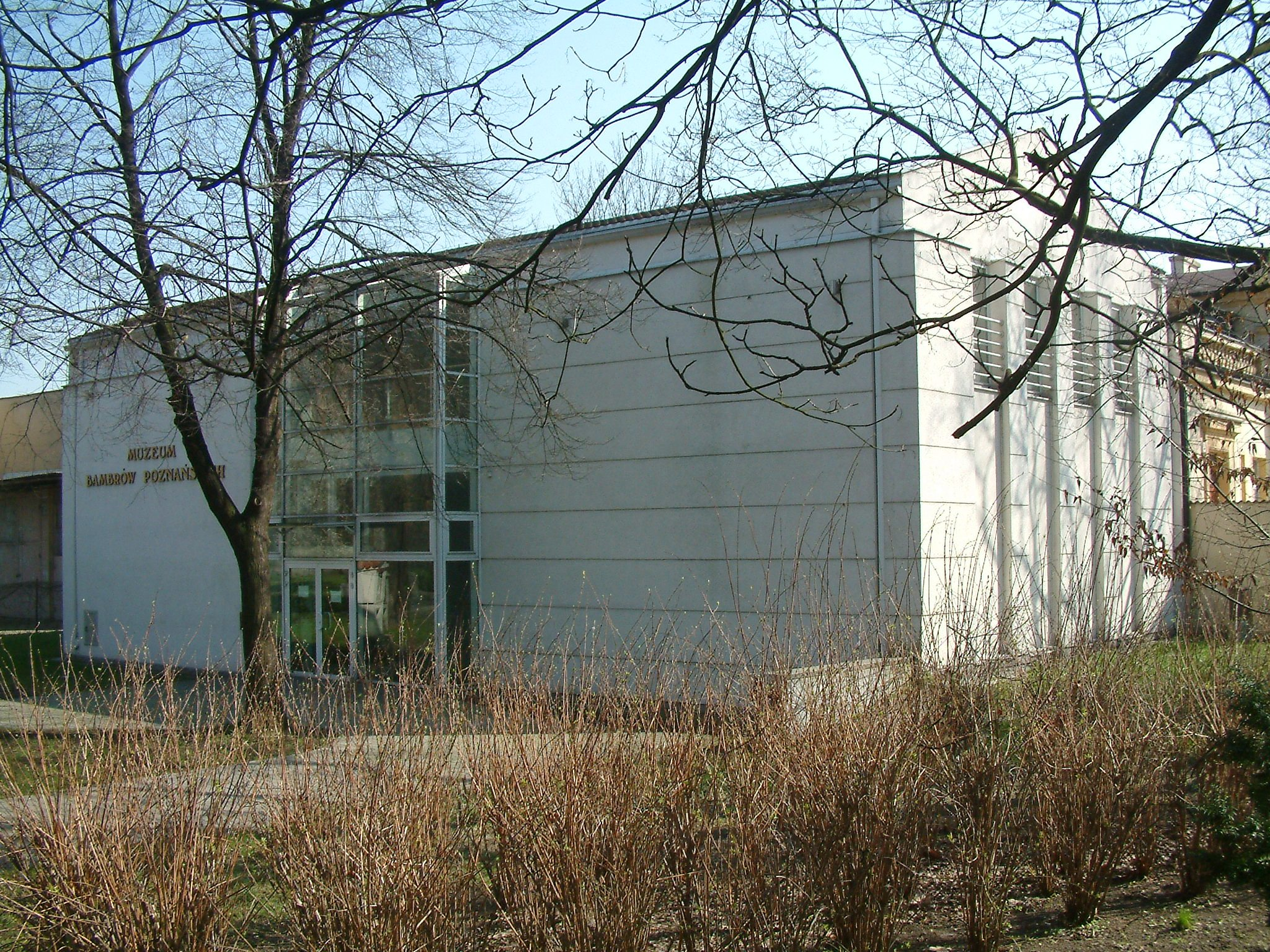 Museum of Bambrzy in Poznań